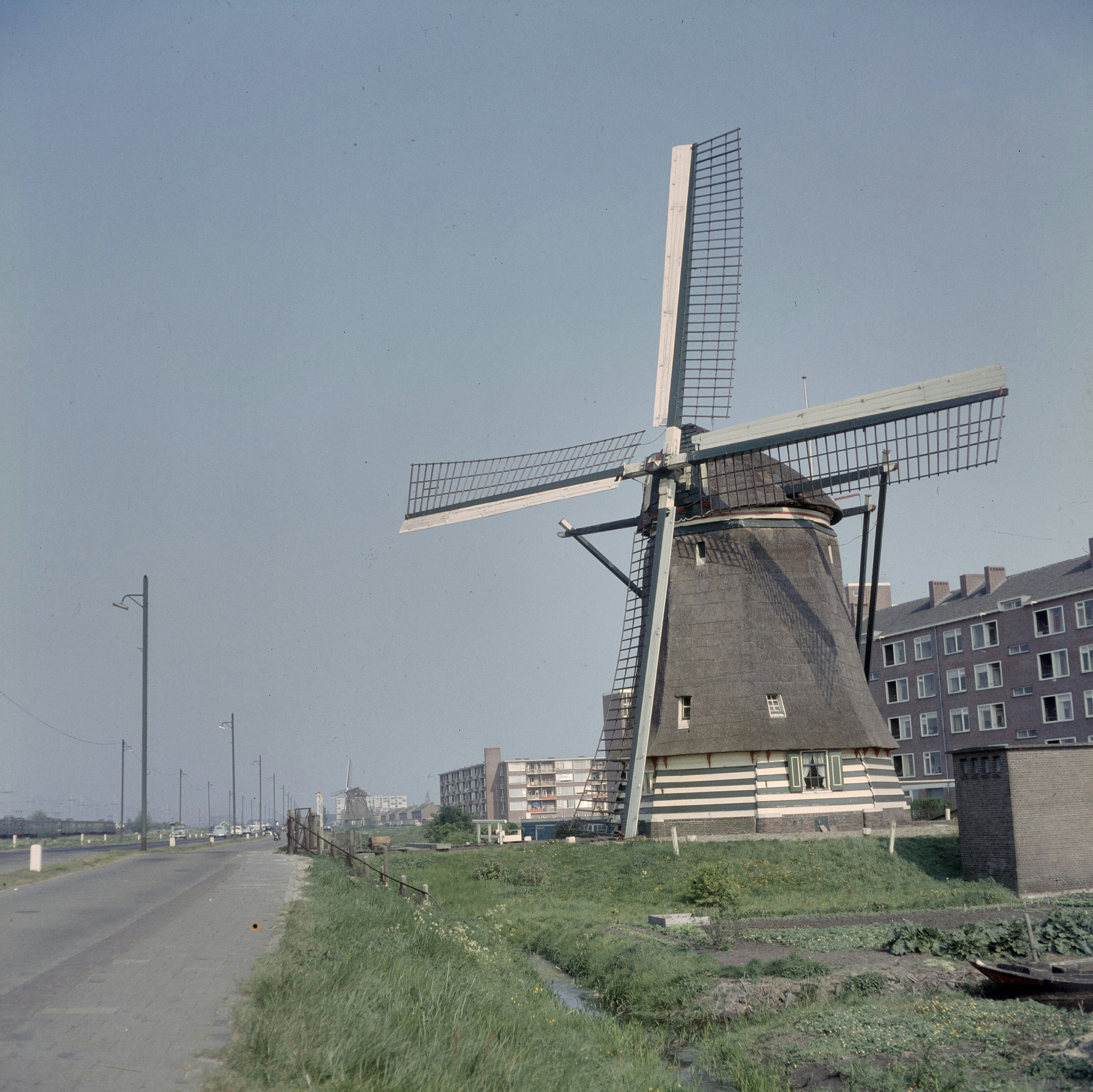 De 1200 Roe: Overzicht met op de achtergrond molen De 1100 Roe die in 1965 is herbouwd op het Herman Bonpad 6 te Amsterdam (opmerking: Diacollectie Molens)